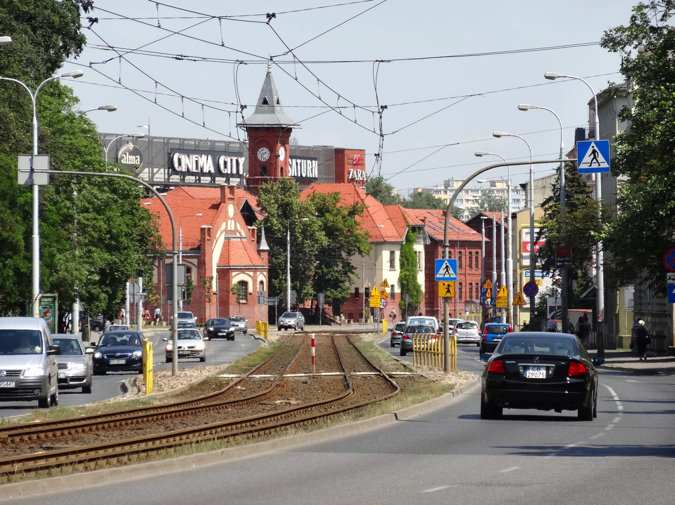 Ulica Jagiellońska w Bydgoszczy